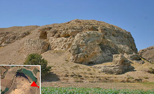 مایی از قصر ابونصر (زاویه دید در آن مشخص گردیده)